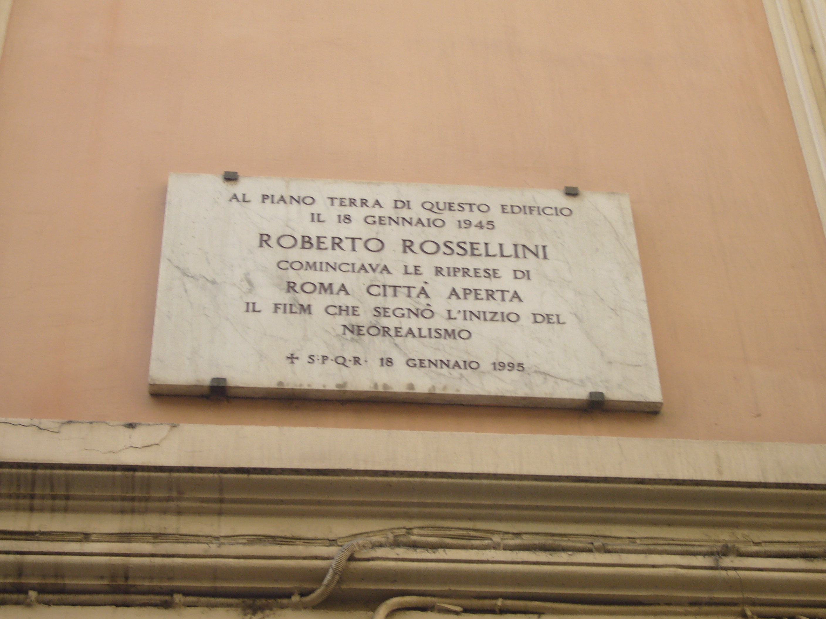 Roma, via degli Avignonesi: memoria di Roberto Rossellini e dell'inizio delle riprese di "Roma città aperta". A cura del Comune di Roma, nel cinquantenario.